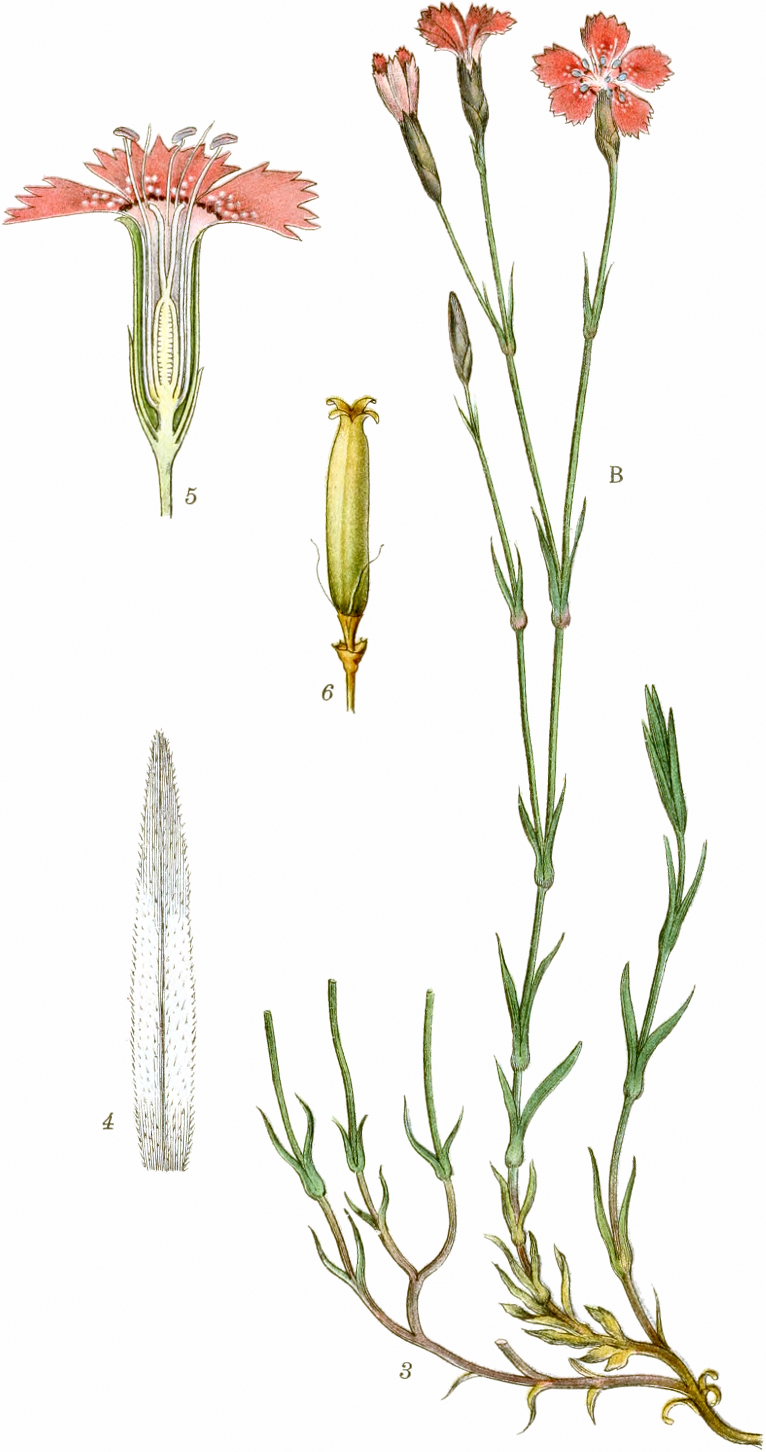 Mentz, A.; Ostenfeld, C. H.: Bilder der Nordflora. Band 2, 1917ff.Heide-Nelke Dianthus deltoides L.Taf. 344. B. Heide-Nelke. Abb. 3. die Pflanze in natürlicher Größe; weitere Stiele wurden abgeschnitten. Abb. 4. Ein Blatt (4/1). Abb. 5. Blüte im Längsschnitt (2/1). Abb. 6. Kapsel (2/1).